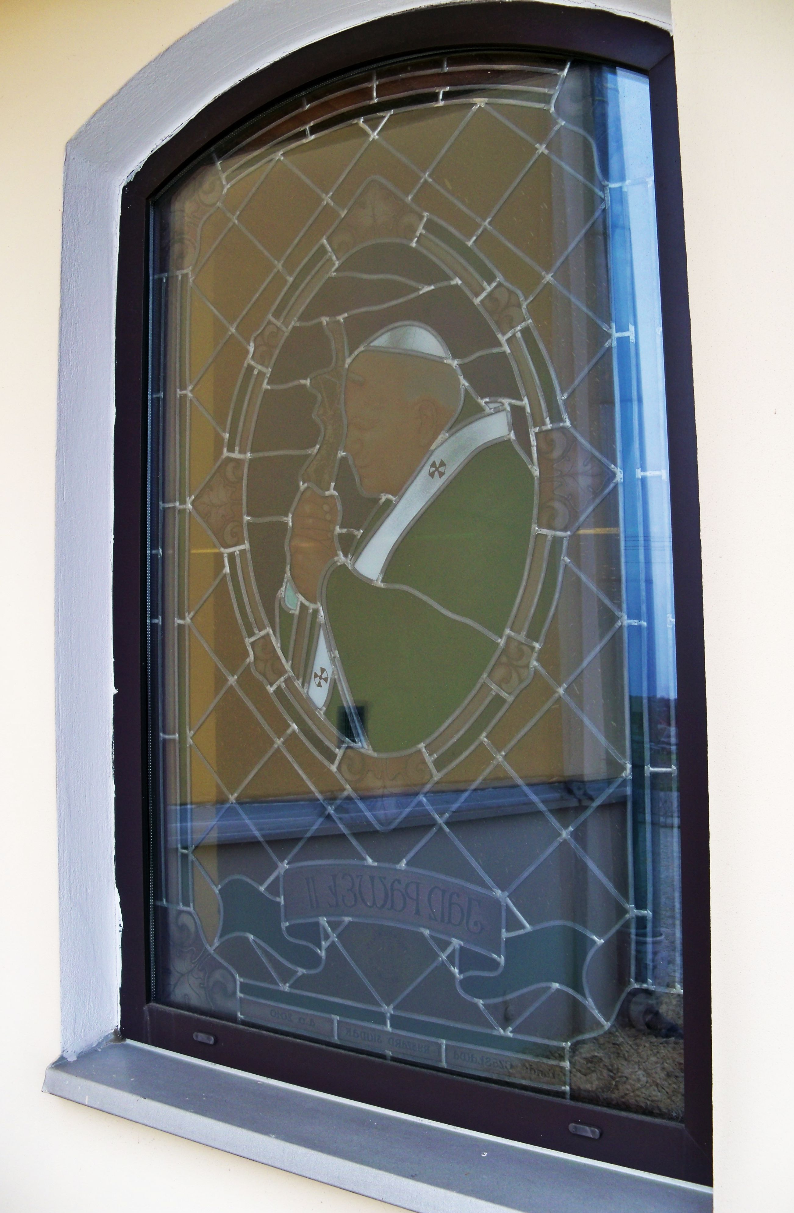 Witraż w kościele w Trzebosi, Jan Paweł II